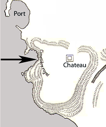 Emplacement du cimetière royal par rapport eu port actuel de Byblos.